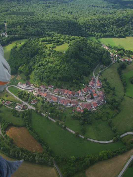 Vue de châtillon depuis un ULM